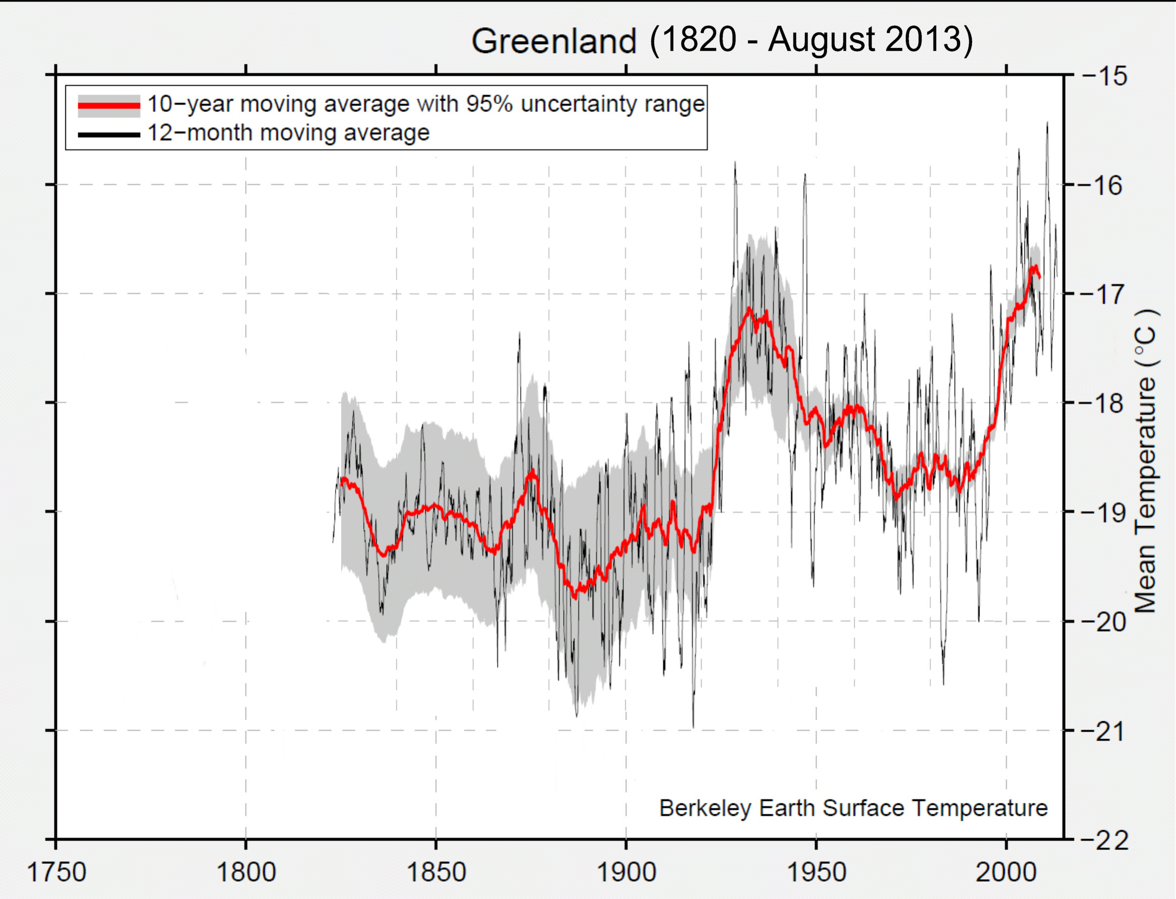 Mittlere Jahrestemperaturen auf Grönland 1820 bis August 2013 als gleitende 12 Monatsmittel. 10-Jahresmittelwerte. - Originaldaten aller Wetterstationen, durch Berkeley Earth (USA) validiert und harmonisert